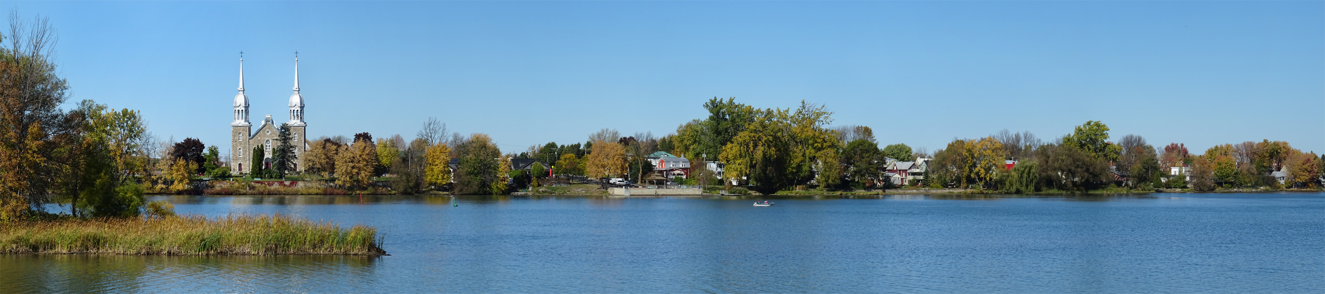 Saint-Antoine-sur-Richelieu, Montérégie, Québec, Canada.